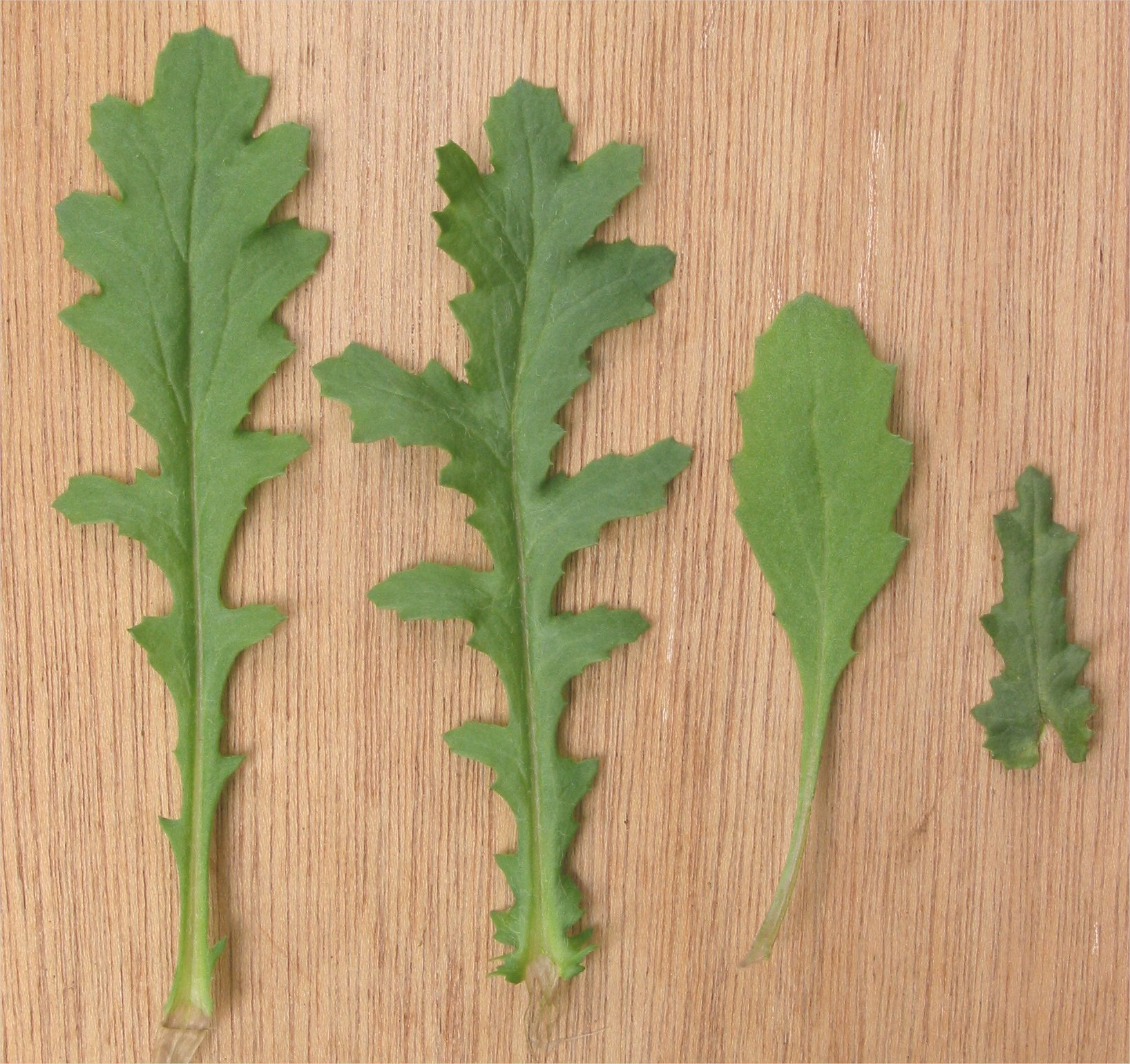 Senecio vulgaris leaves